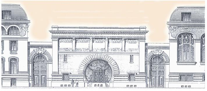 Bouwtekening van het kantoor van Mumm door Ernest Kalas (1861-1928)̺